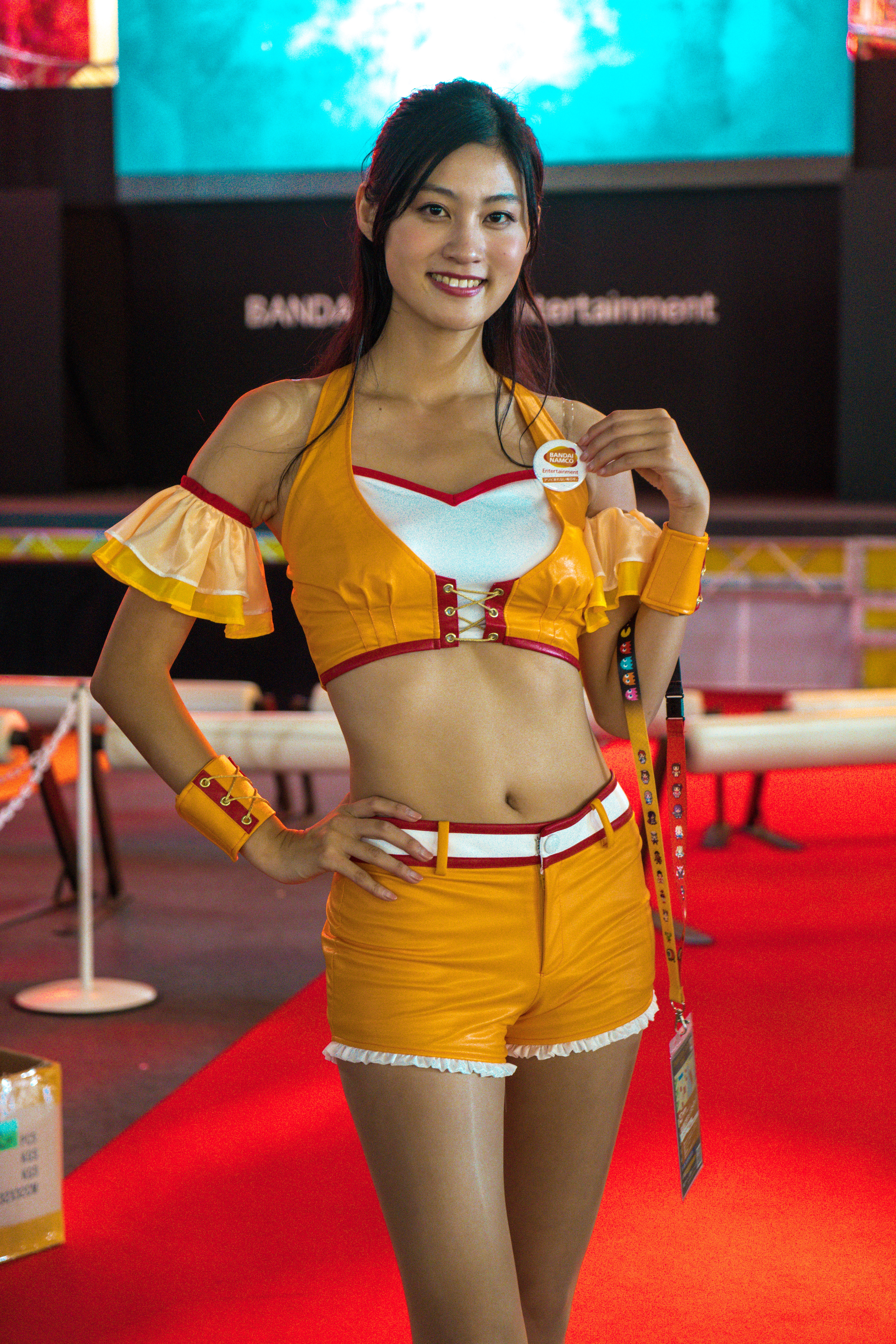 Tokyo Game Show 2018 (TGS)